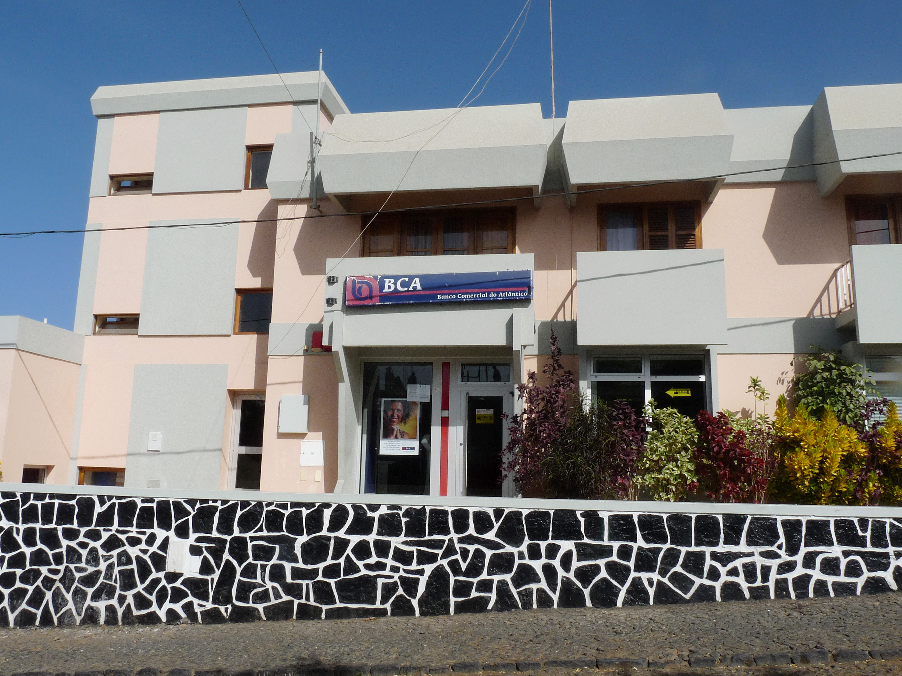 Banco Comercial do Atlântico (BCA) à São Filipe (île de Fogo, Cap-Vert)